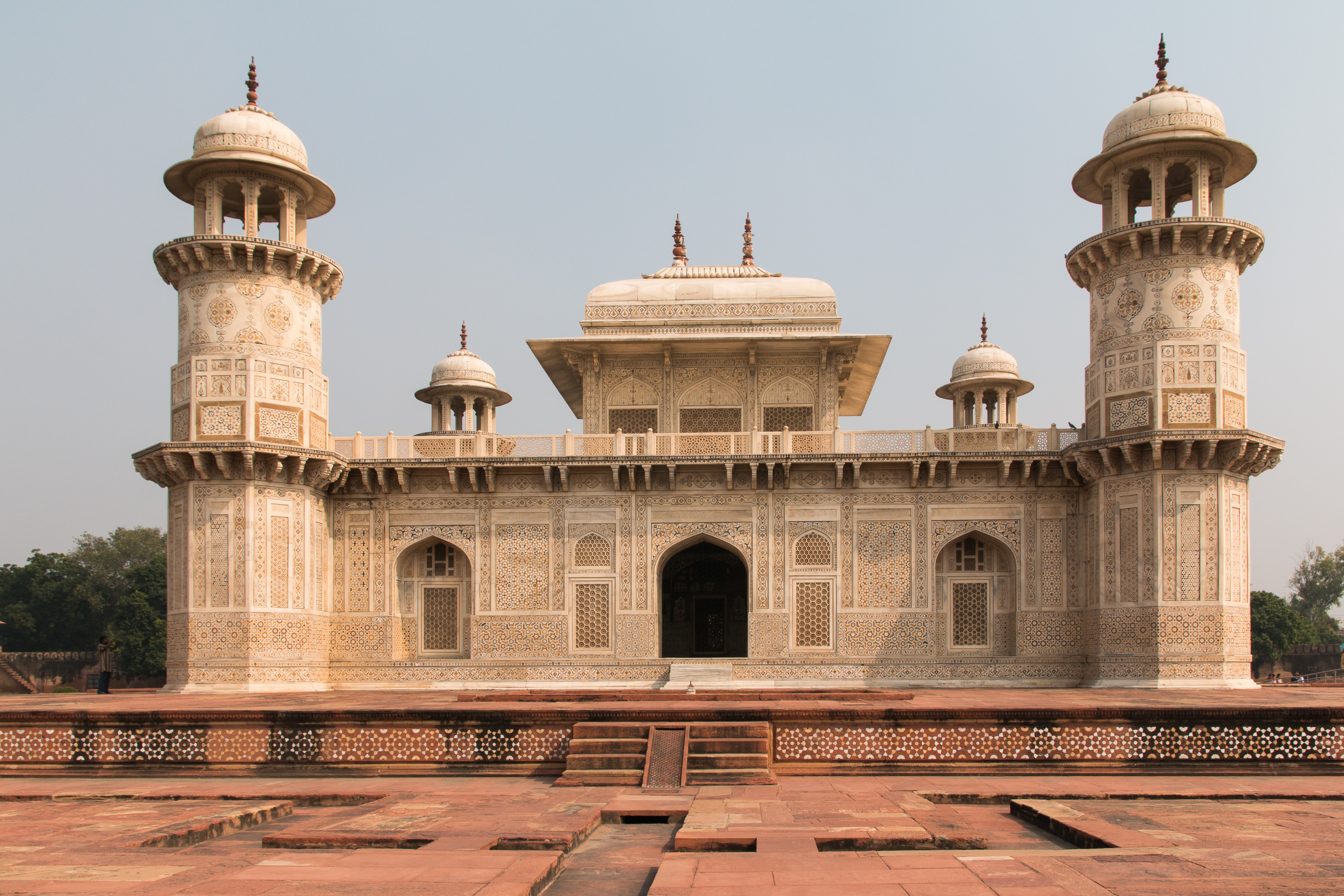 Itmad ud Daulah mausoleum.